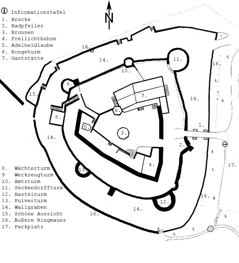 Plan vom Schlossberg Königsberg